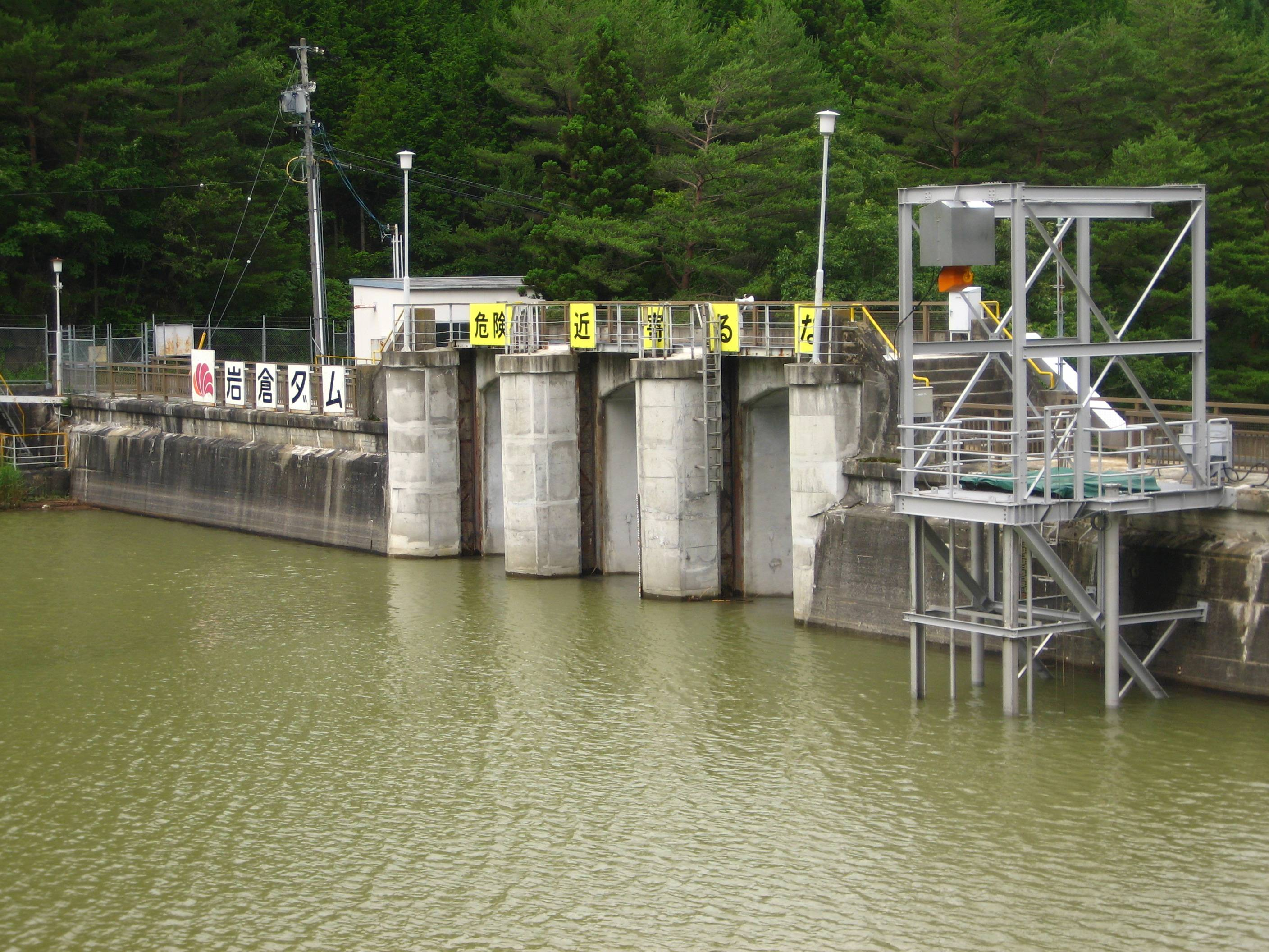 Iwakura Dam (岩倉ダム) in Urugi village, Nagano prefecture, Japan.